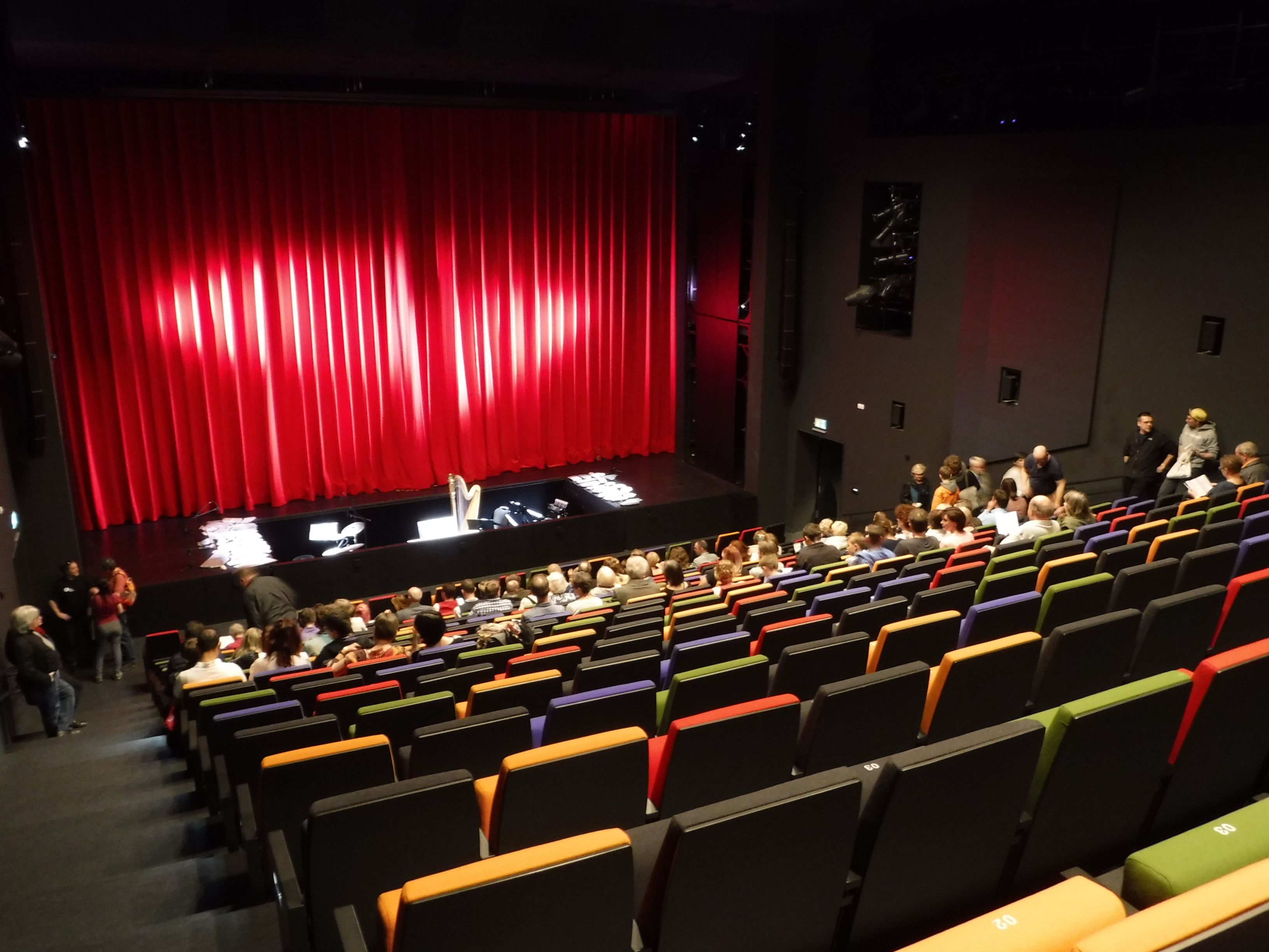 Saal des Theater Junge Generation im Kulturkraftwerk zur Langen Nacht der Dresdner Theater